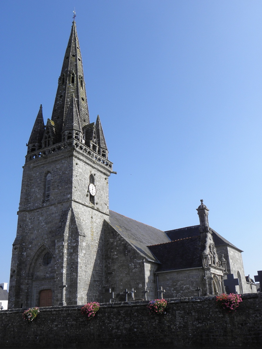 Tour-clocher de l'église Saint-Hervé de Lanhouarneau (29). .